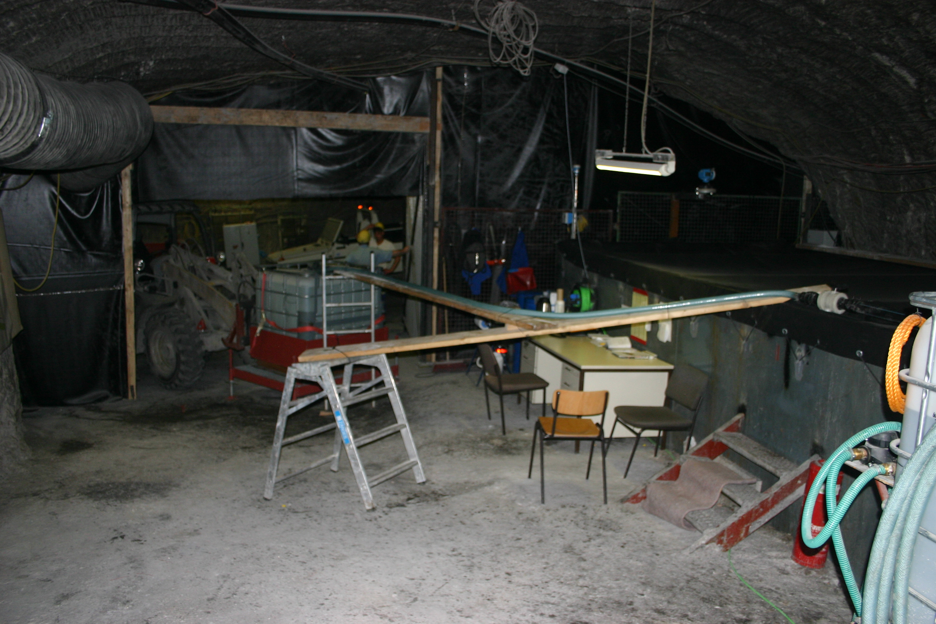 Laugen-Management auf der 658 m-Sohle im Bergwerk Asse II, rechts im Bild das abgedeckte Sammelbecken, von dort wird die Lauge in 1000 l-Behältern auf Europaletten nach Übertage verbracht